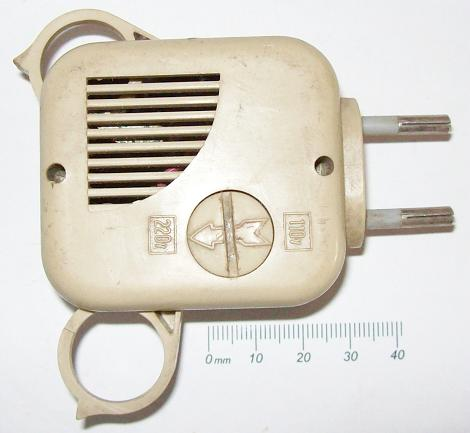 Lader für Nickel-Cadmium-Knopfzellen einer Hörhilfe; das Gerät besitzt keine Netztrennung, daher werden die Knopfzellen berührungssicher mit Bügeln eingelegt. Die Ladestrombegrenzung erfolgt im Gerät mithilfe eines zum Gleichrichter in Reihe geschalteten Kondensators.